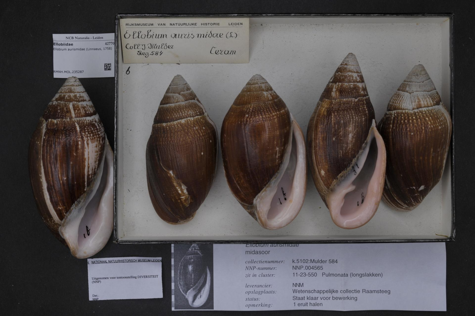 Ellobium aurismidae (Linnaeus, 1758)